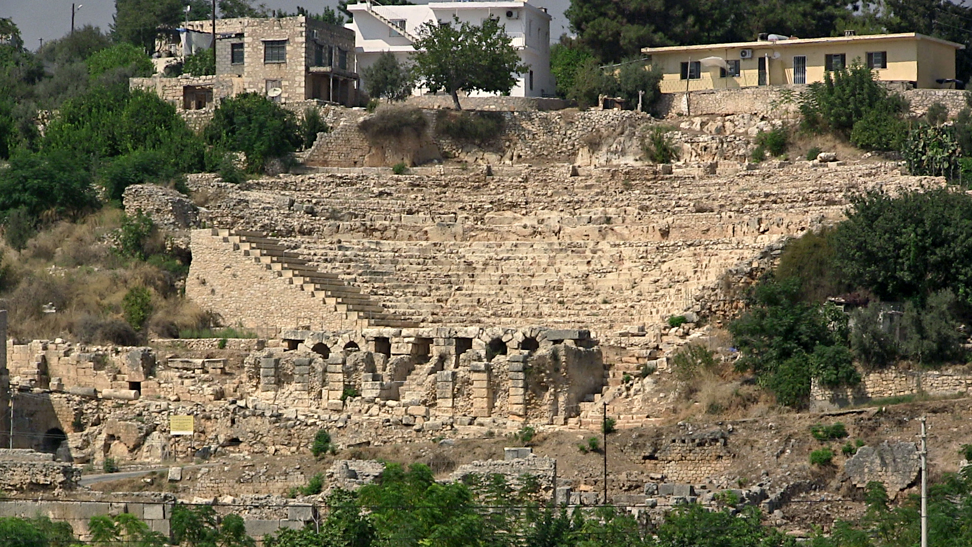 Theater Elaiussa Sebaste, heute Ayas bei Erdemli, Südtürkei